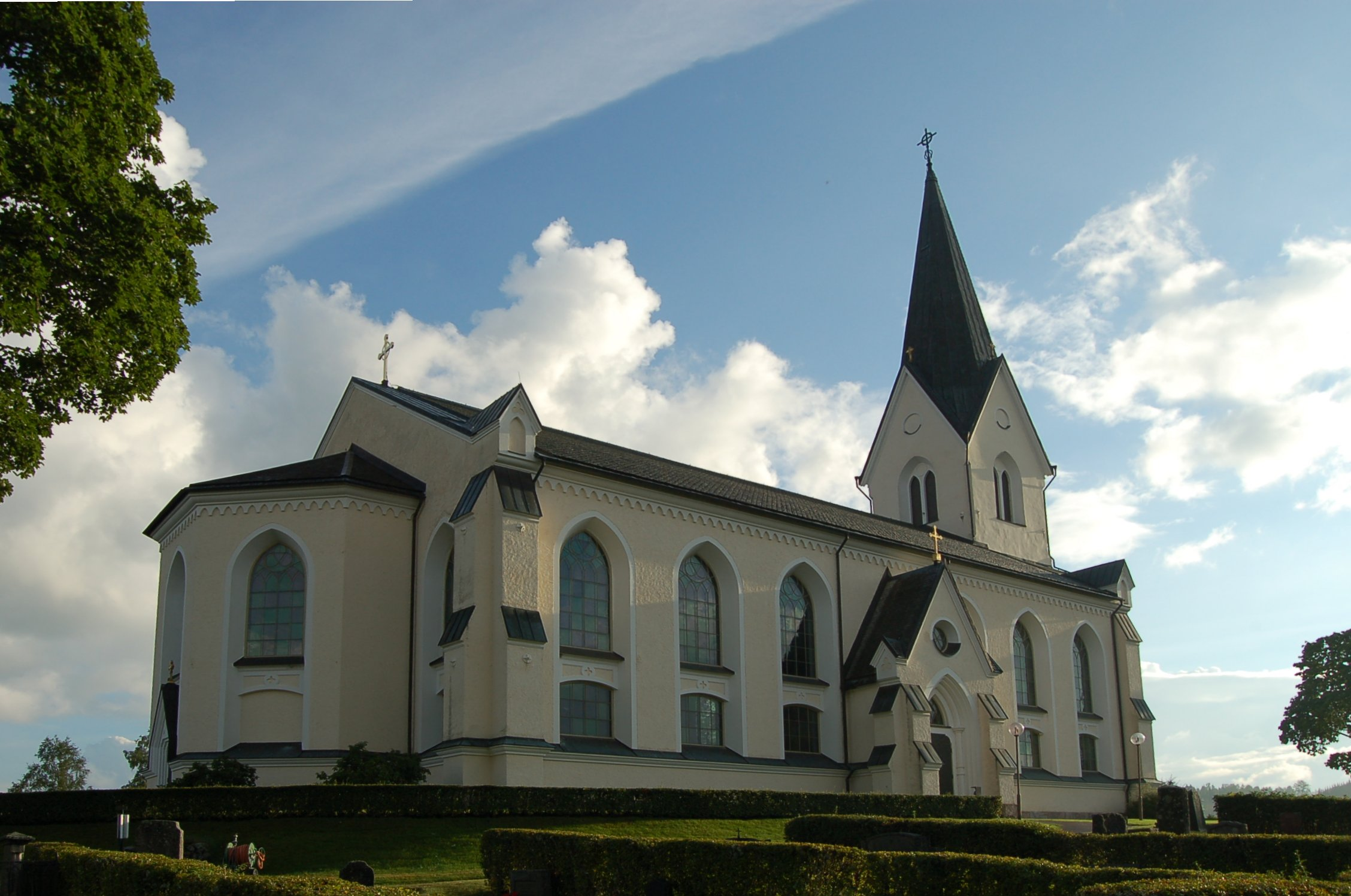 Brunskogs kyrka från nordost